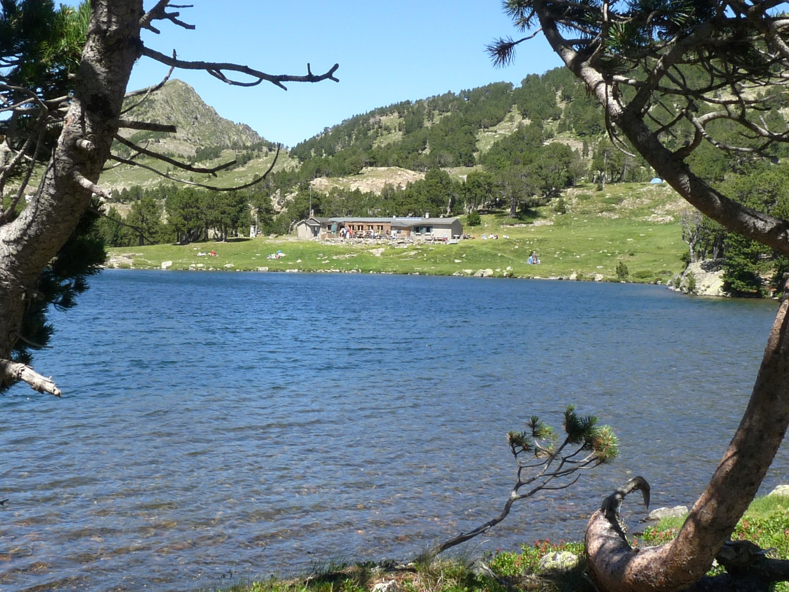 Estany del Mig et refuge des Camporells, Formiguères, Pyrénées-Orientales, France